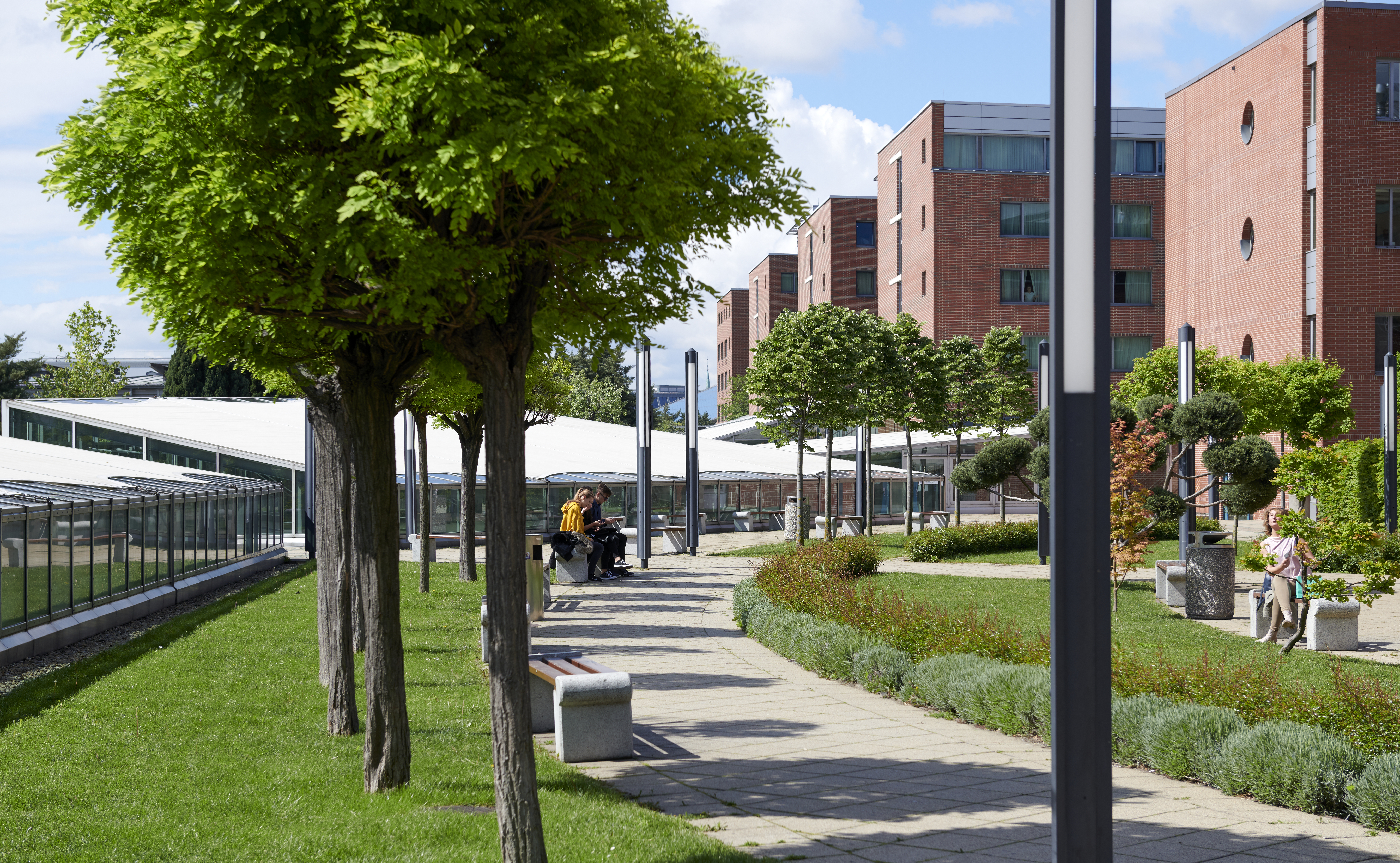 3 hektáros Tetőkert, mely 35 féle növénynek és 11 madárfajnak ad otthon